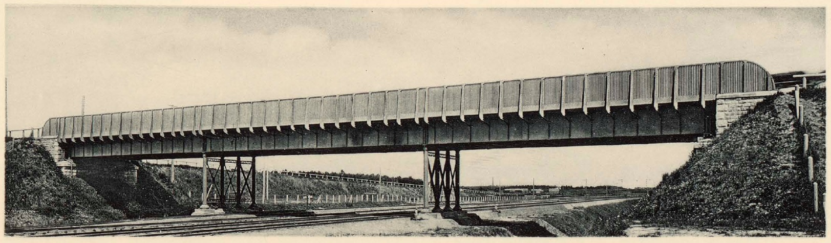 Старый путепровод Петербургского шоссе через Окружную железную дорогу.